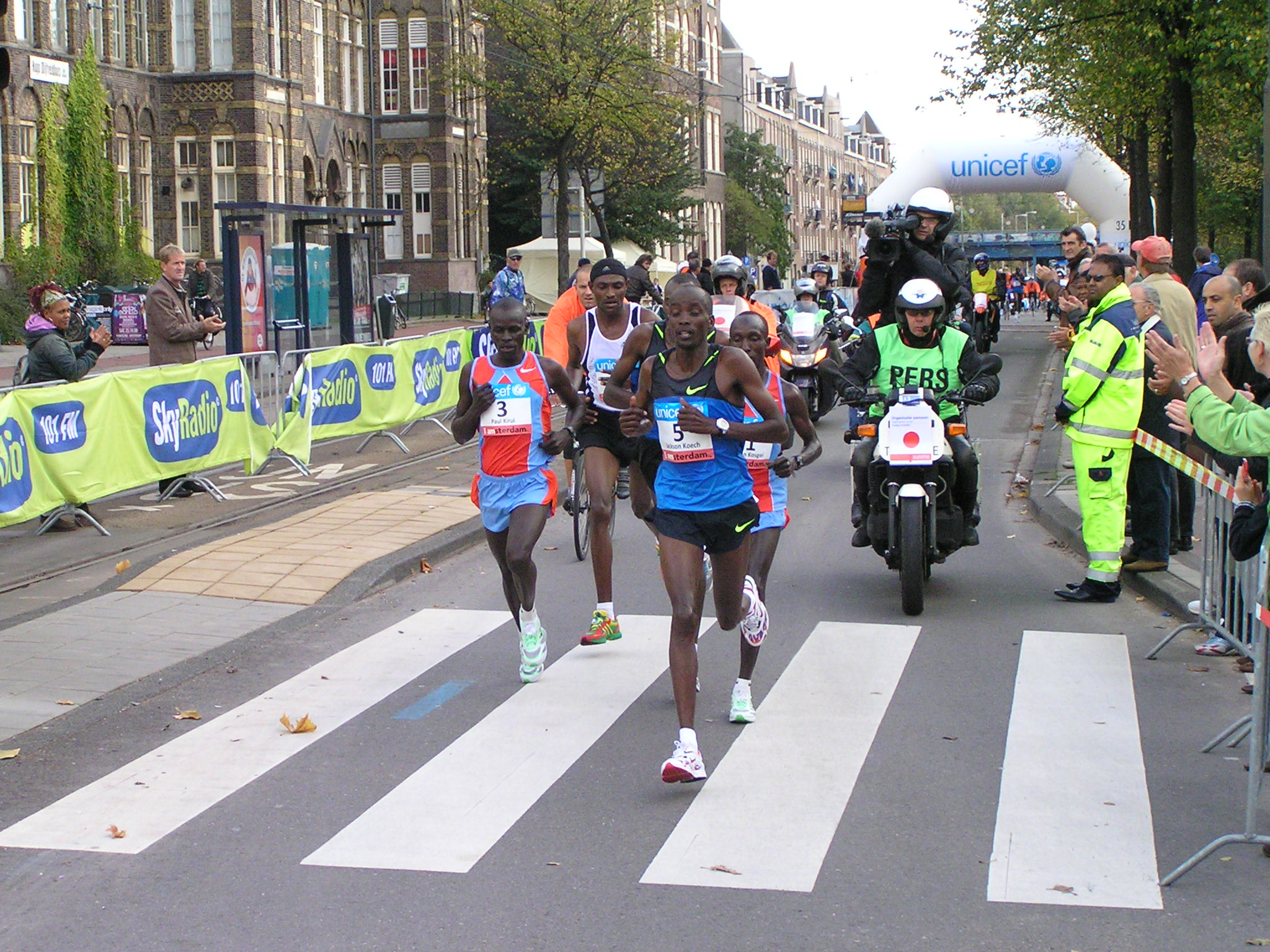 Marathon van Amsterdam, 2008. De kopgroep net voorbij het 35-kilometerpunt.